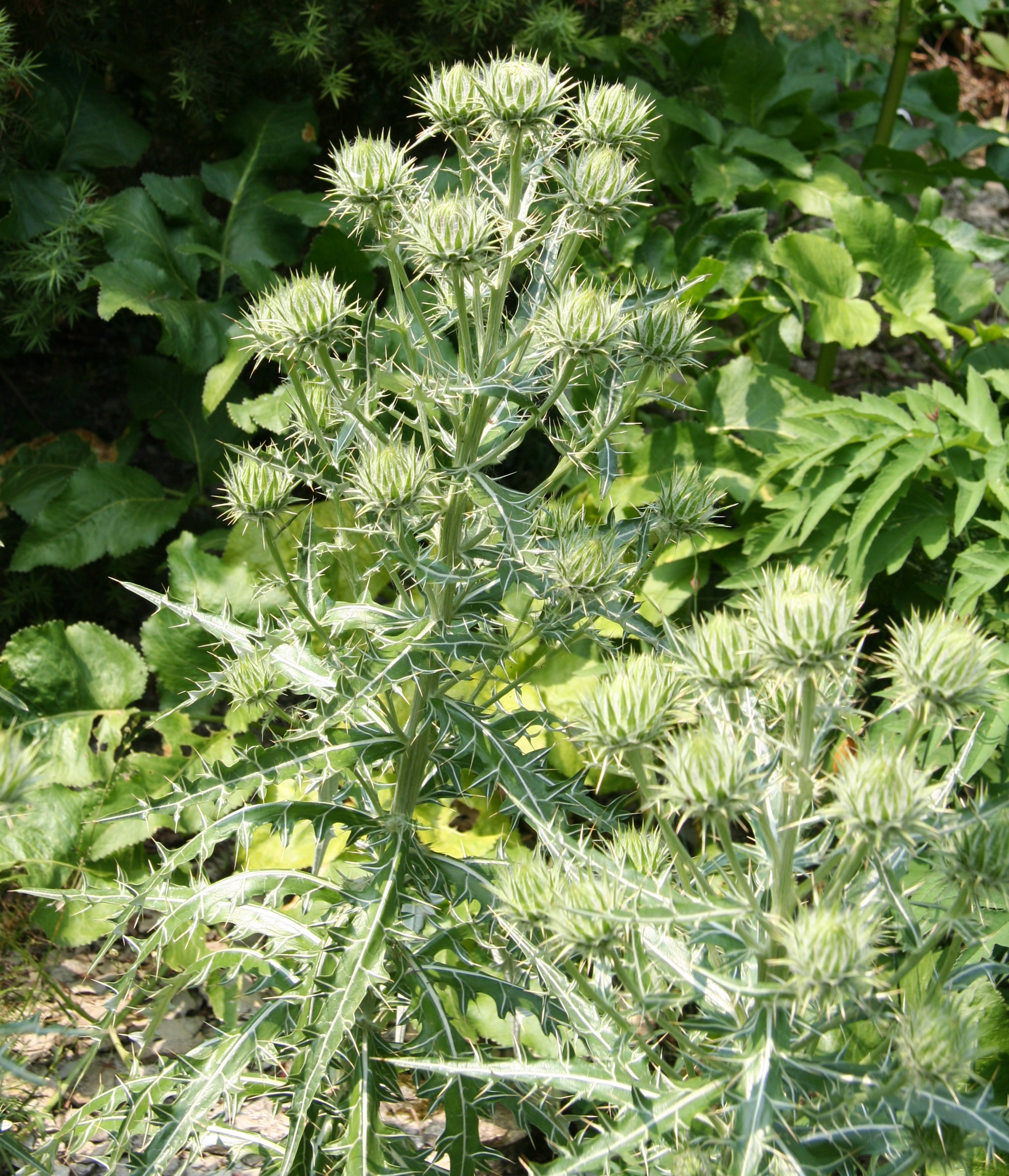 Ptilostemon afer im Botanischen Garten Dresden